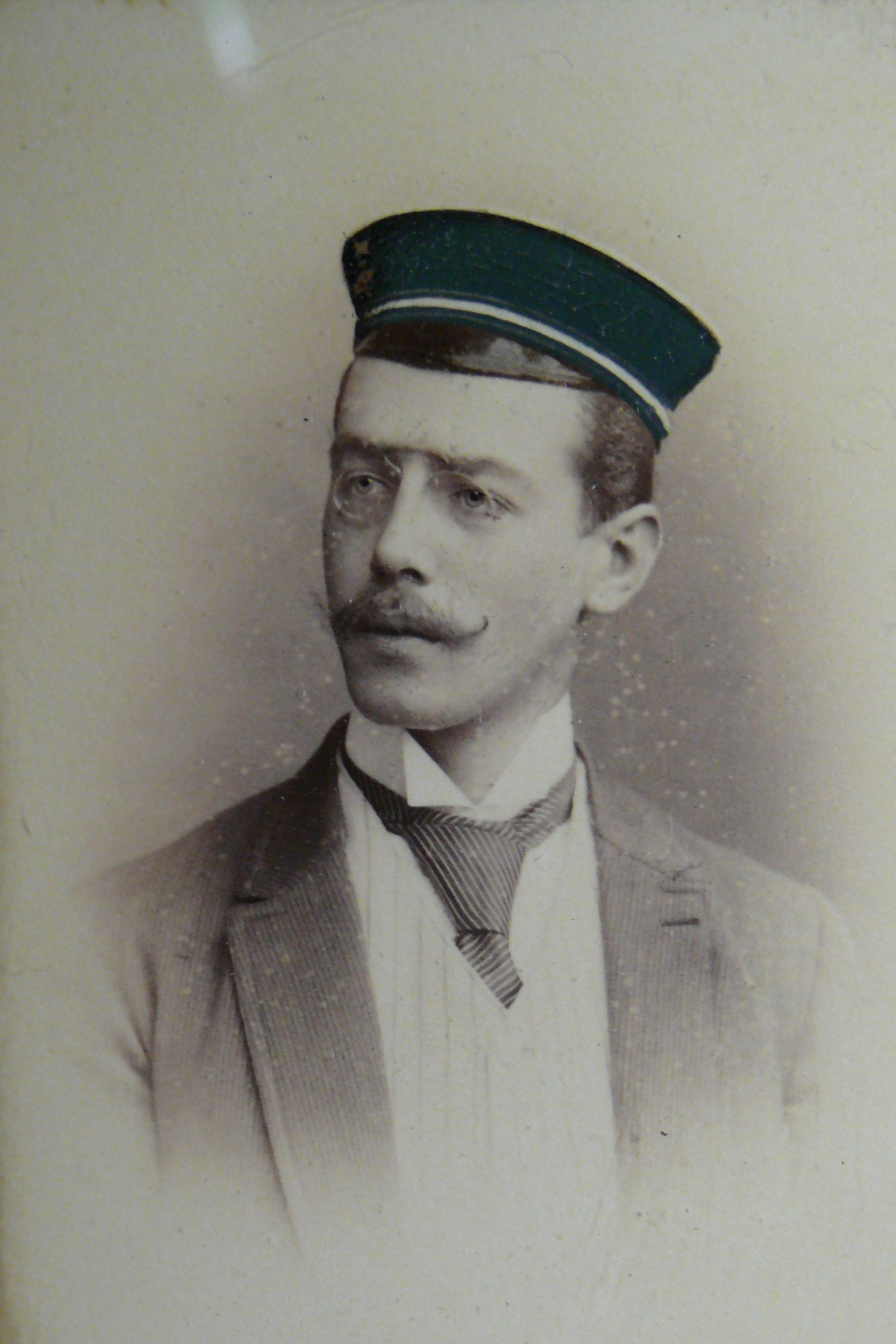 Porträtfotografie von Theodor Schmieding